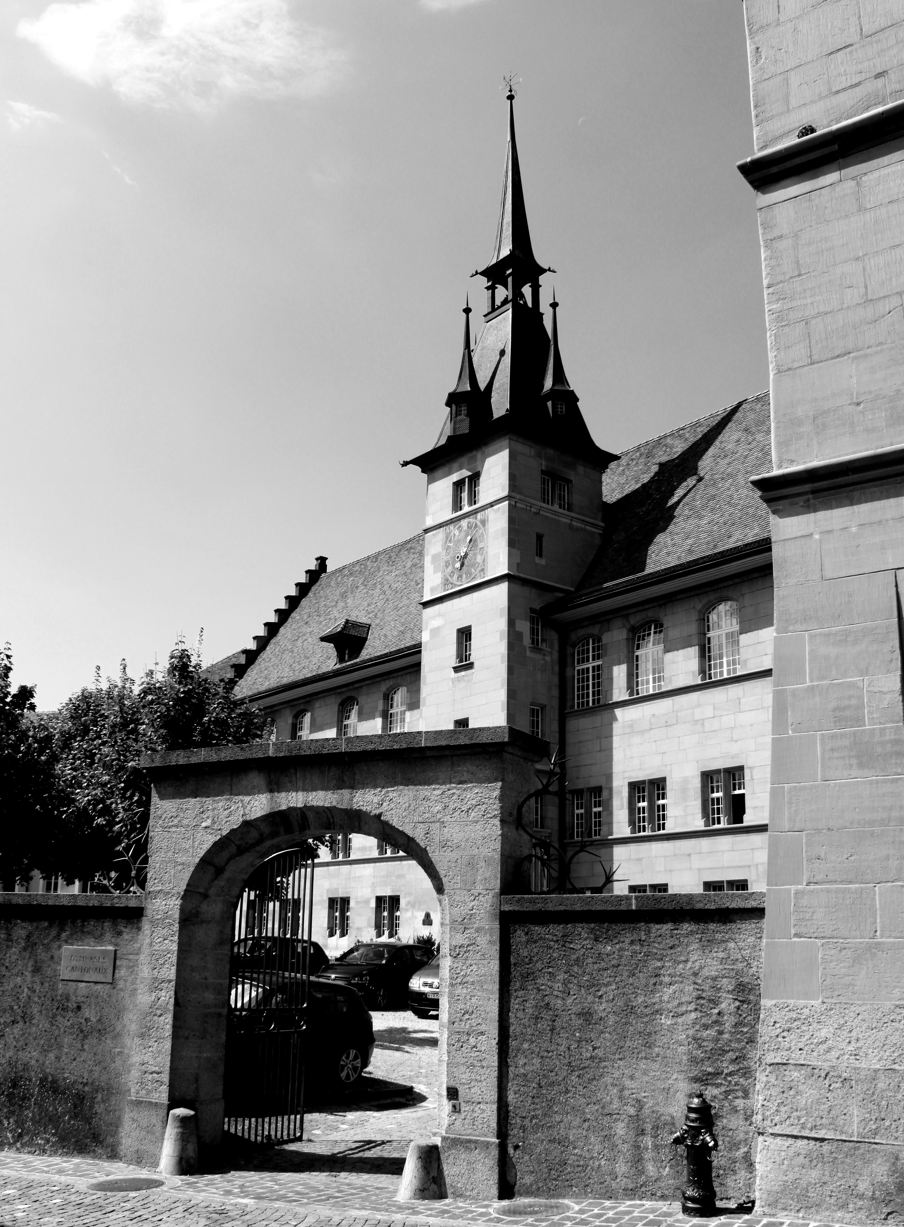 Suisse, canton de Vaud, Lausanne, Ancienne Académie. Édifiée de 1579 à 1587 pour héberger l’école de théologie, lieu de formation de l’élite intellectuelle réformée. D'influence bernoise. Accueille un gymnase aujourd'hui.